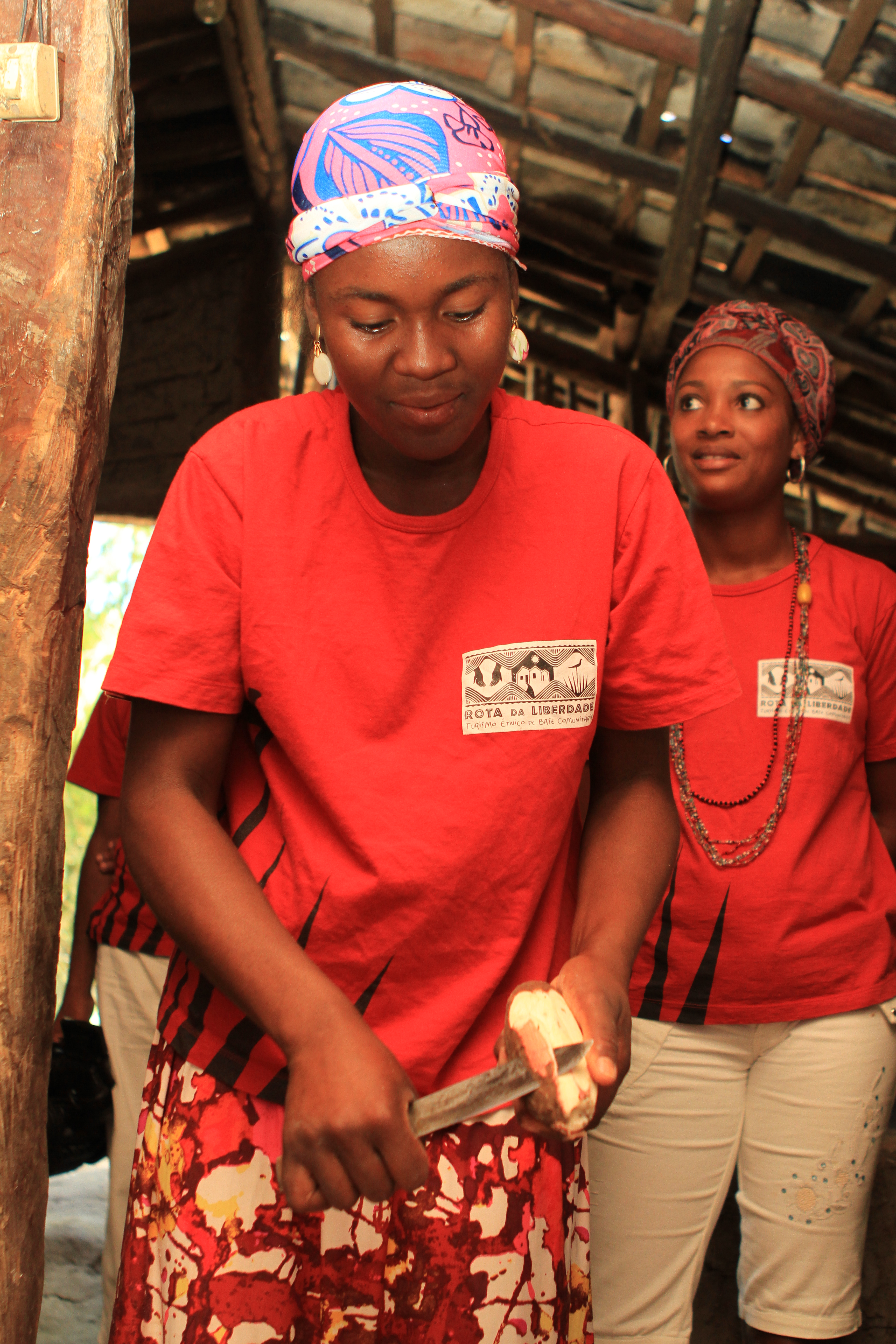 Instrument rudimentaire pour réduire le manioc en farine